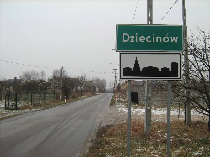 Dziecinów